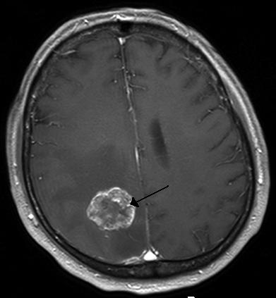 MRT einer Hirnmetatase eines Bronchialkarzinoms (T1 nach Kontrastmittelgabe)